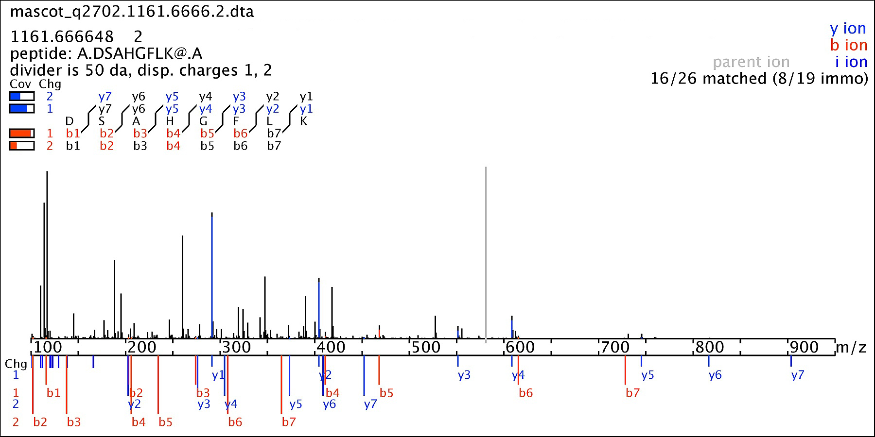 Das Peptid DSAHGFLK des Proteins TRFE_HUMAN